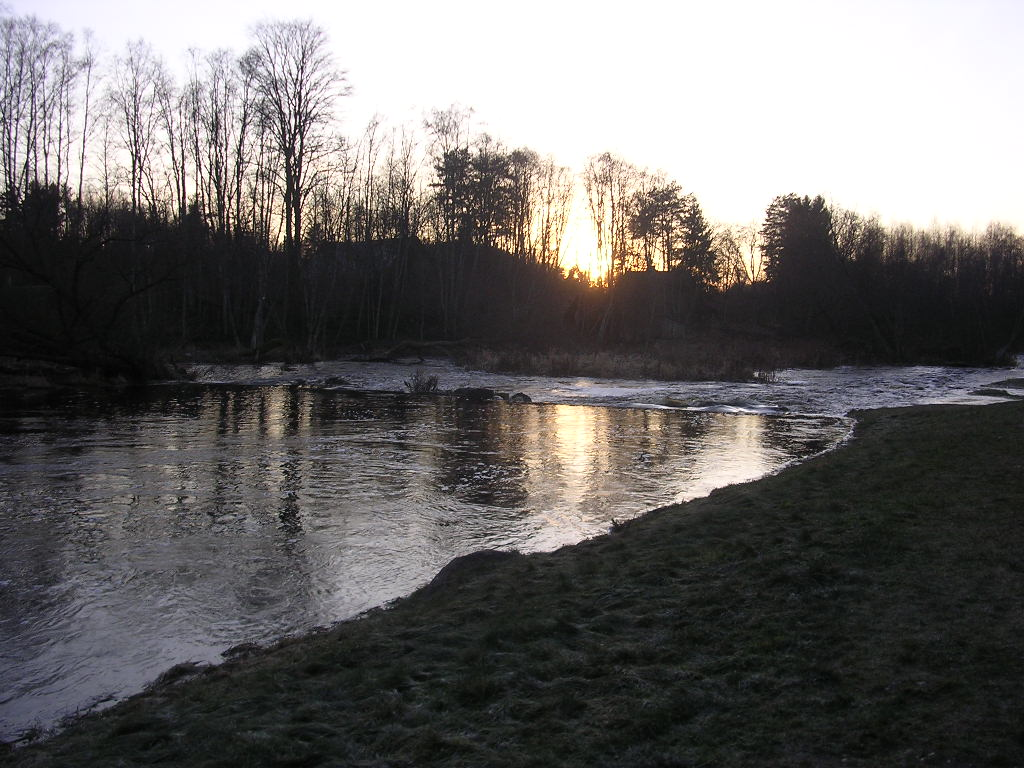 Navesti jõgi Vanaõuel (Vihi küla)